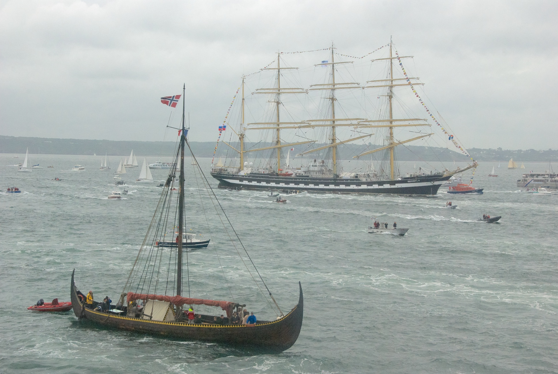 Tonnerres de Brest 2012 : Armada Brest - Douarnenez : Au premier plan , le drakkar Gaïa, en arrière-plan le 4 mâts barque Kruzenshtern.